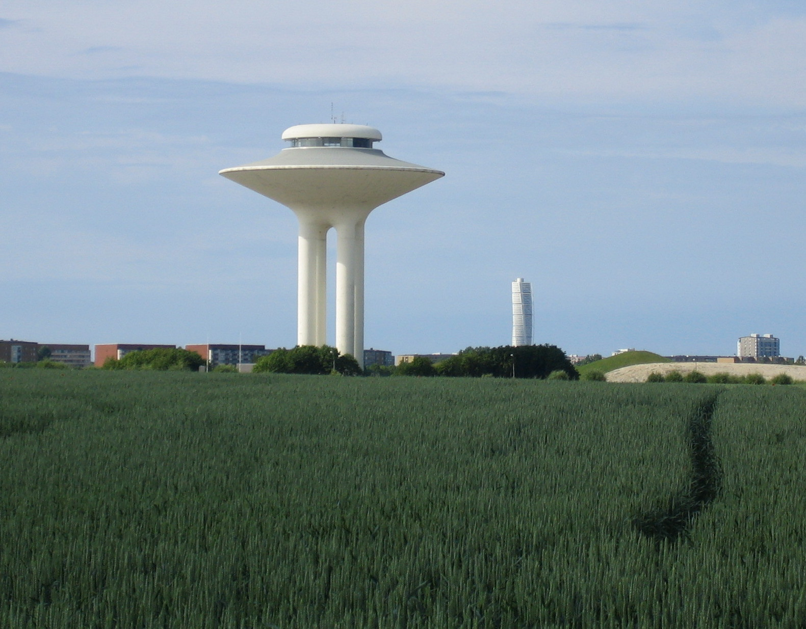 Hyllie water tower in Malmö, Sweden.